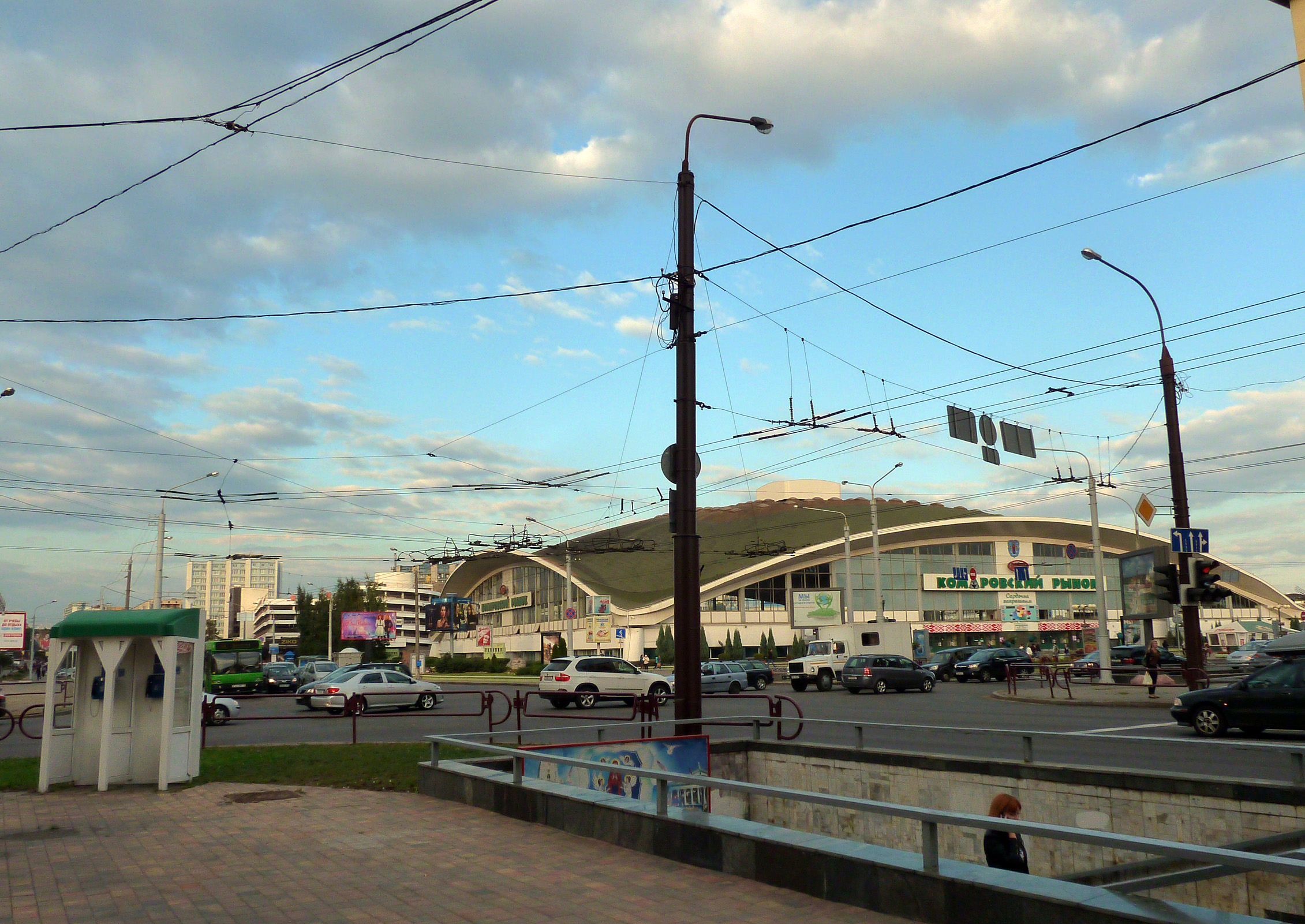 Kamarouski rynak